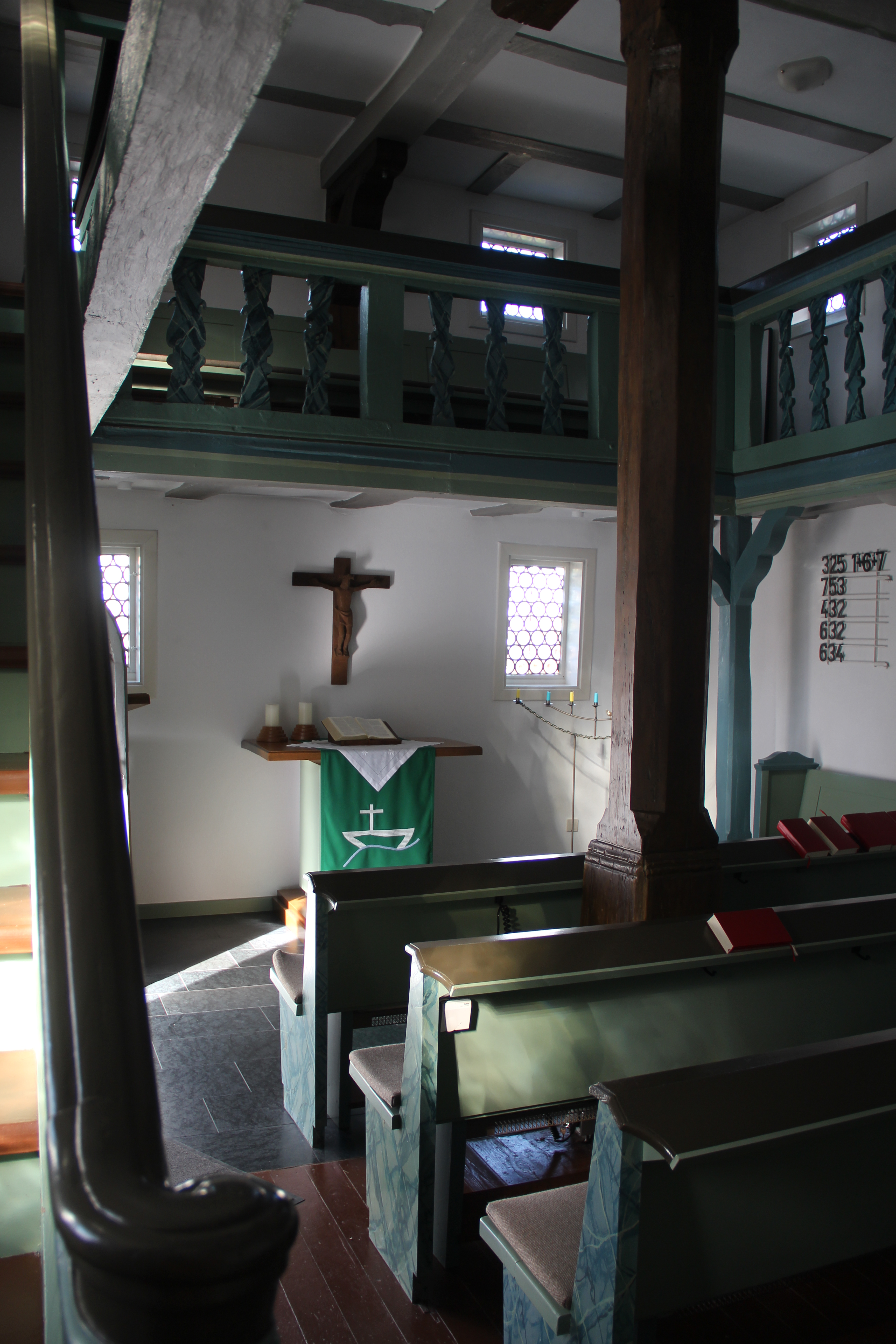 Kapelle Rachelshausen. Blick von der Südwestwand auf die Norostwand. Links der Treppenaufstieg zur Empore. Unter der Treppe befindet sich die Eingangstür (Norwestwand)